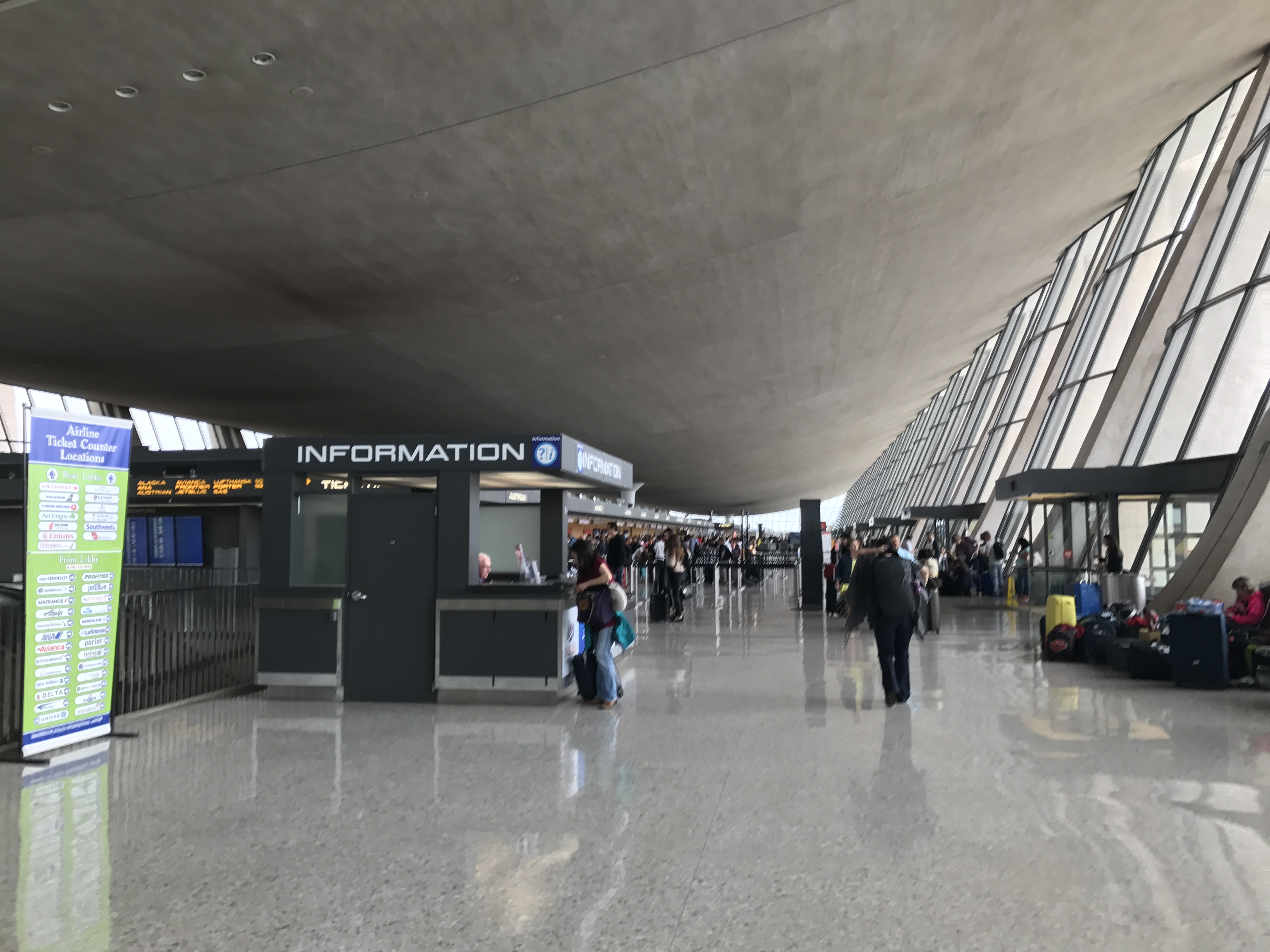 Terminal Principal del Aeropuerto Internacional de Washington Dulles.